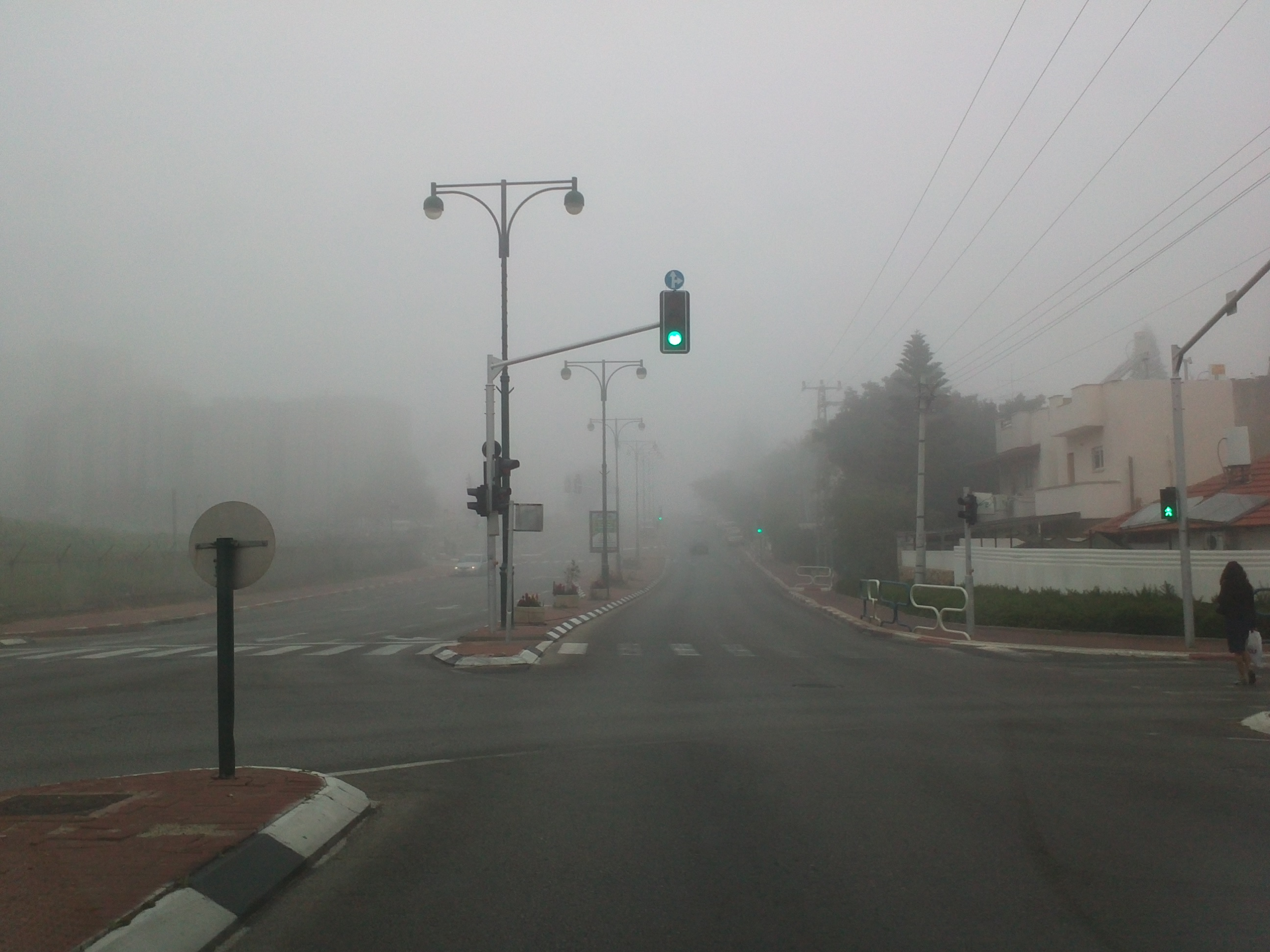 Туман в Израиле.